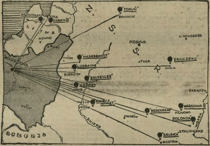 Mapa pokazująca trasy przelotu balonów podczas zawodów w 1935 roku.